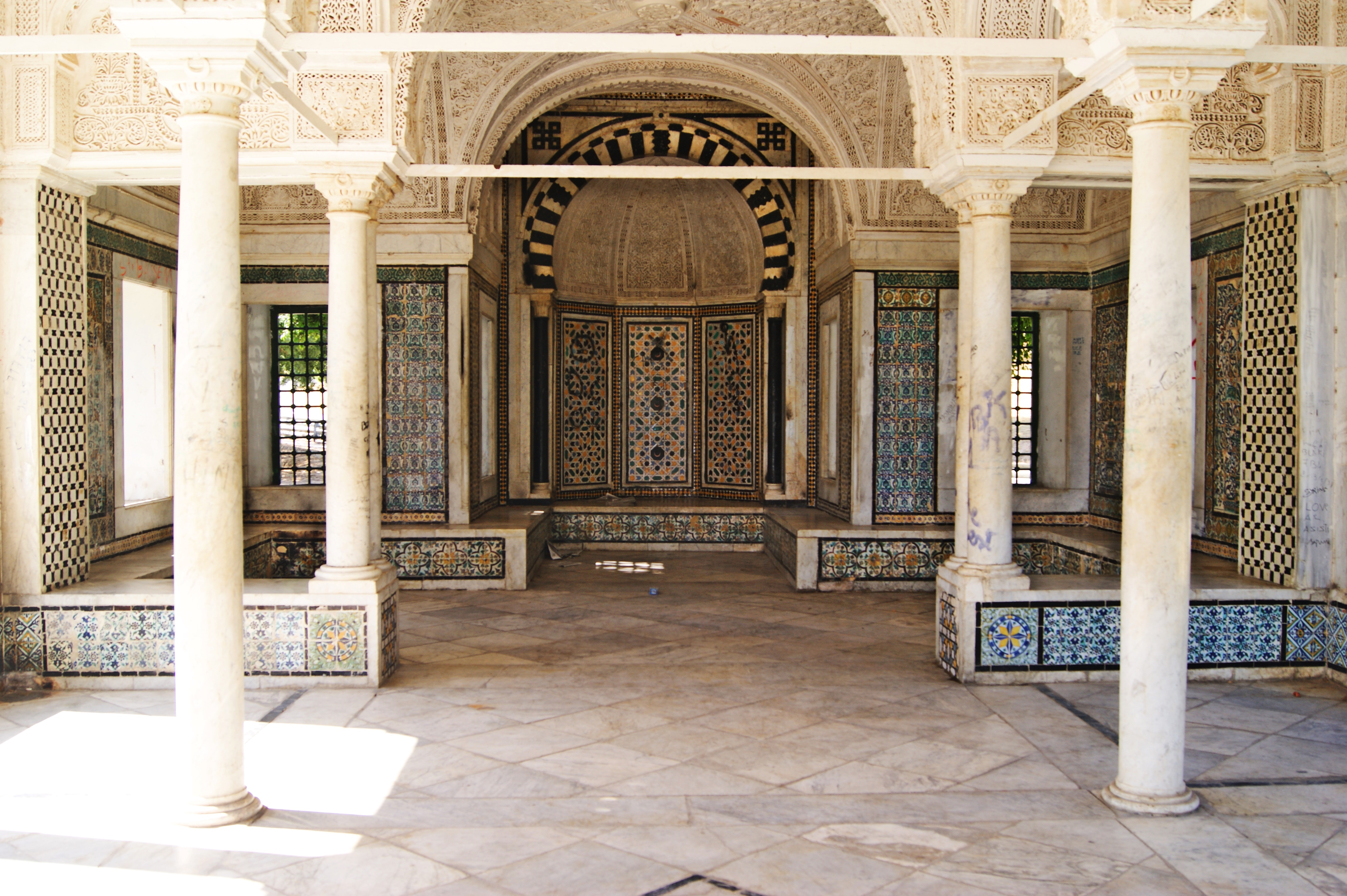 Pavillon mauresque à cinq coupoles